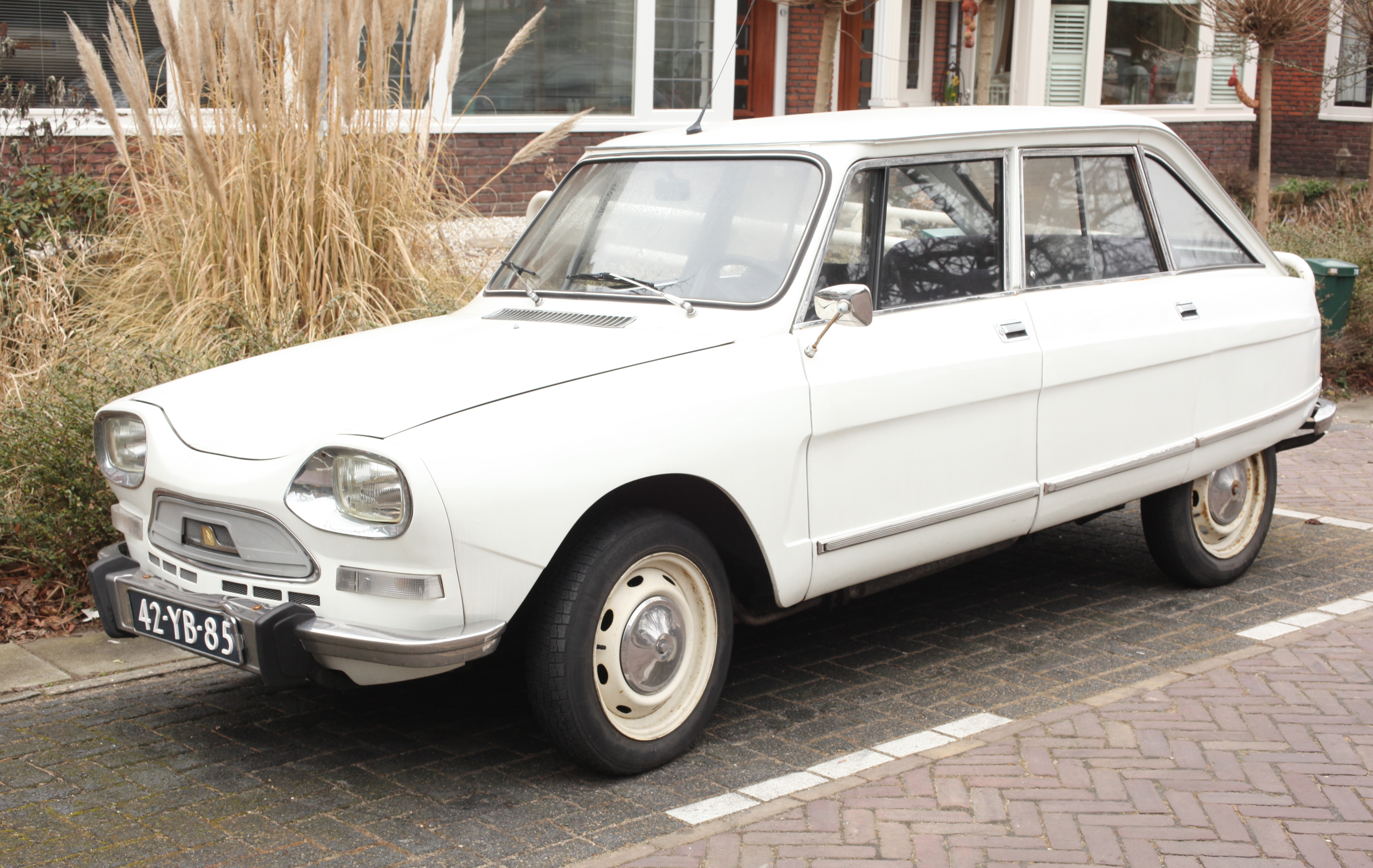 1973 Citroen AMI Super